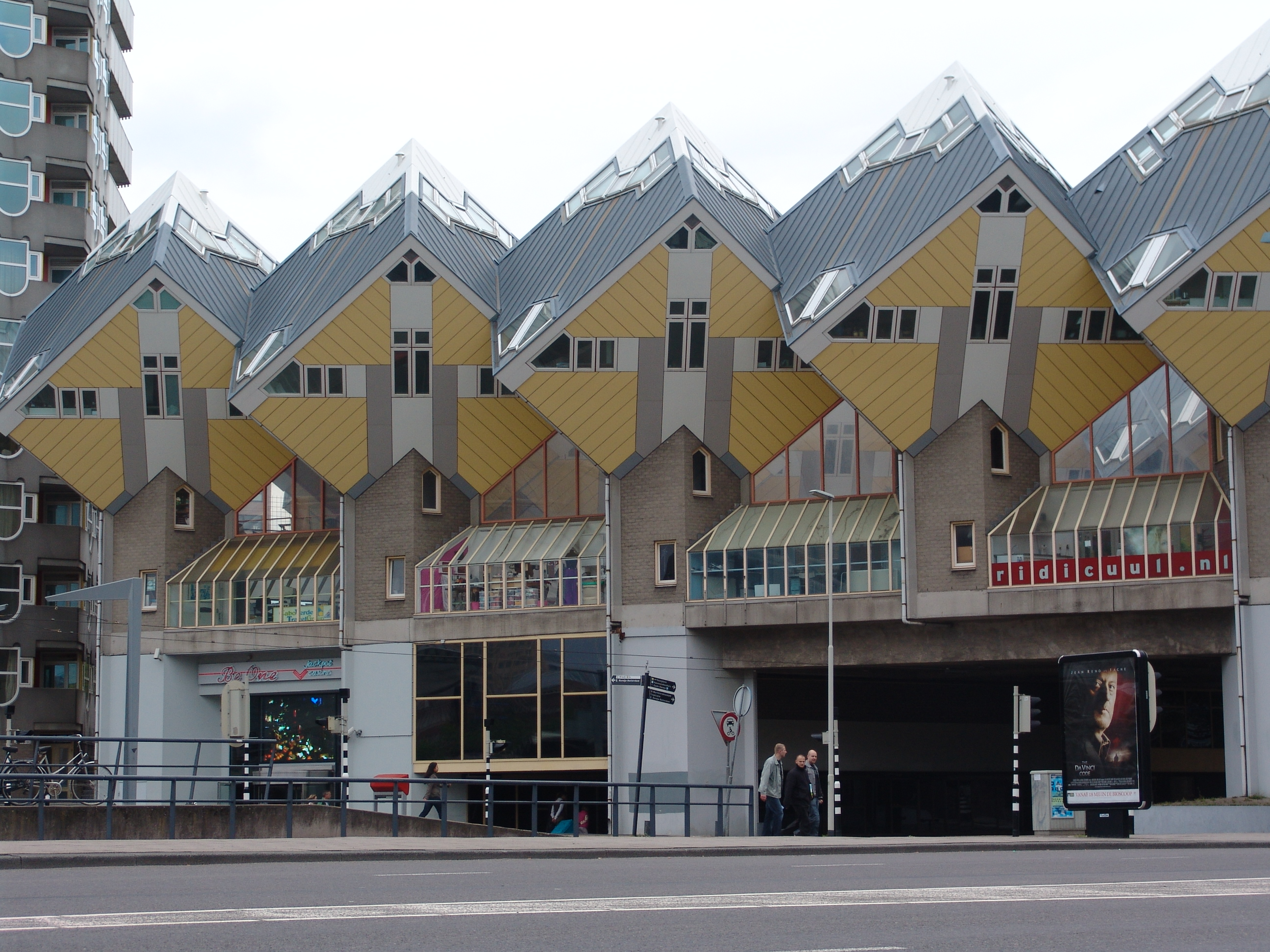 Hasan Sami Bolak tarafından çekilen bu resim, tanıtıcı alt yazı hatasından dolayı("Rotterdam" yerine "Amsterdam" yazım hatası) yeniden yüklendi. (H.S.Bolak)